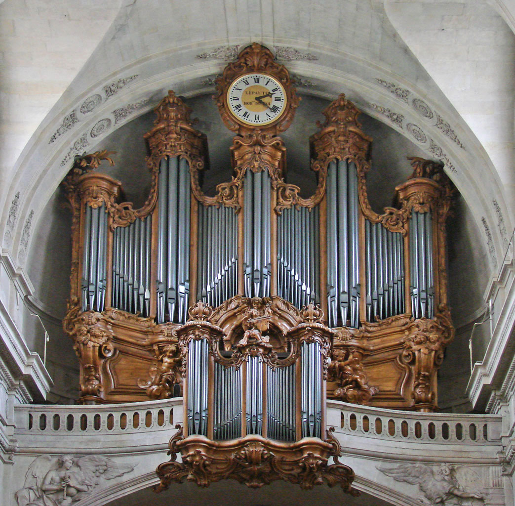 Les grandes orgues de l'église SAINT-ROCH - Paris (France) Cavaillé-Coll a restauré en 1839 l'instrument historique réalisé par Clicquot en 1756, il fit de nouvelles interventions en 1858 et 1881. Le buffet est de style Louis XV L'instrument comprend : 4 claviers manuels et pédalier 53 jeux Traction mécanique des claviers et des jeux 2832 tuyaux Voir les sites sur les orgues de la MRT La route des orgues Aristide Cavaillé-Coll